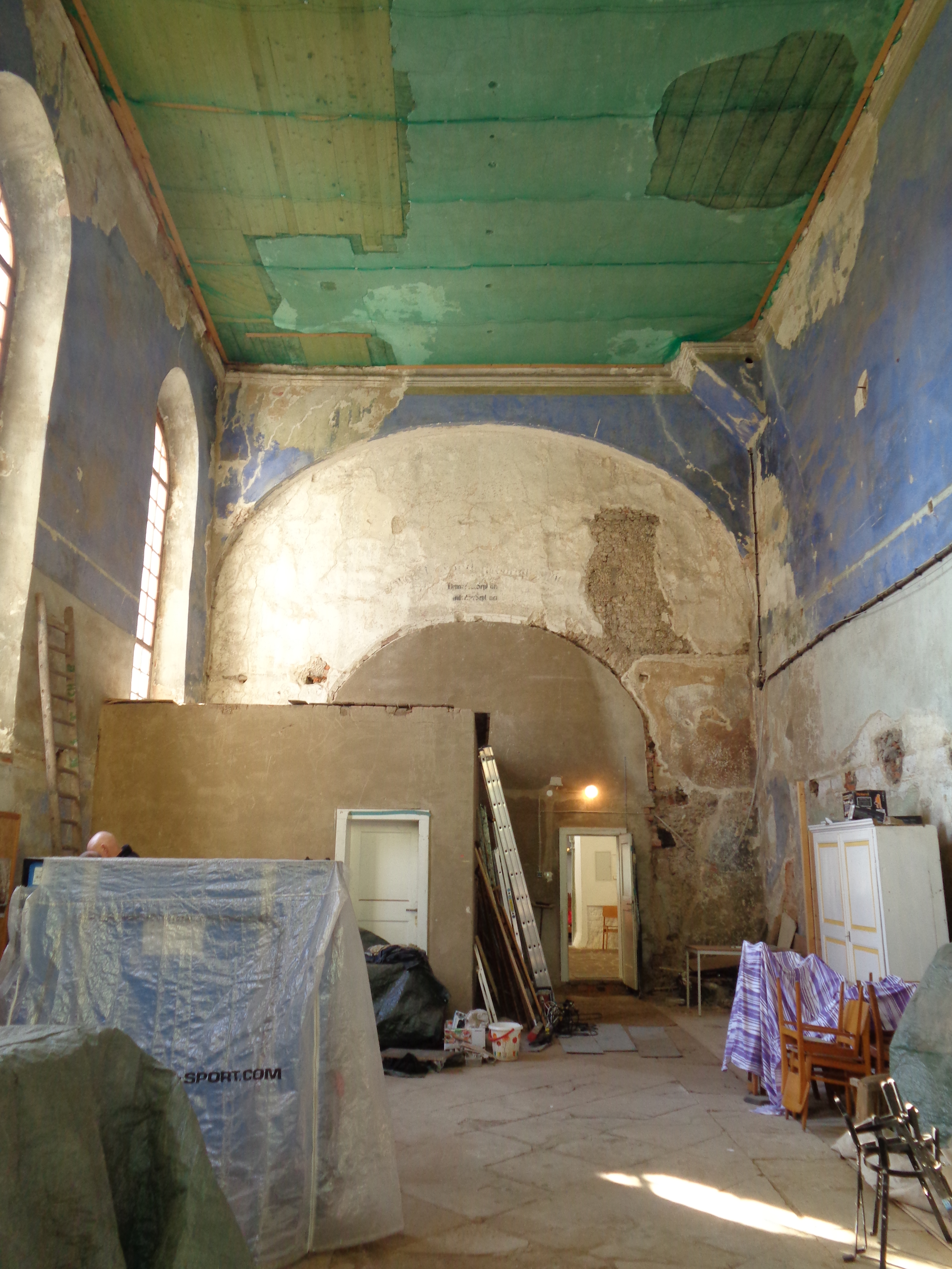 Stadtkirche Mutzschen, durch Mauer abgetrennter Chor, Blick nach Westen